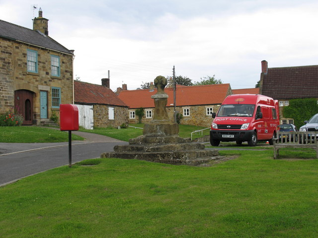 Mobile Post Office